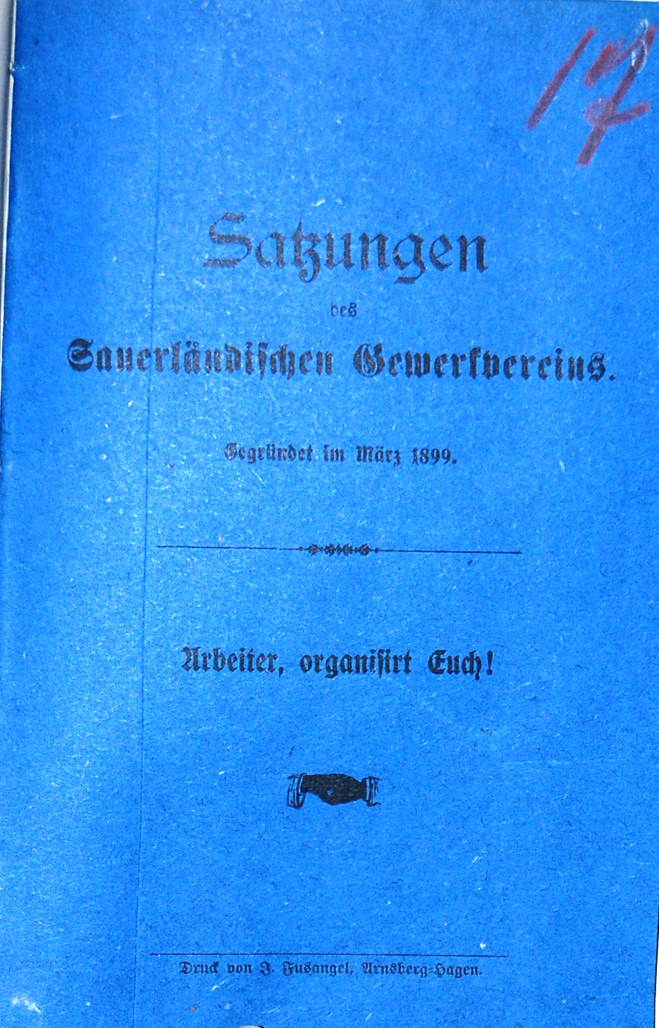 Satzung des Sauerländer Gewerkvereins (1899-1903)